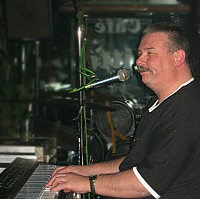 Zelfgemaakte foto, toestemming van Arie om deze te plaatsen.